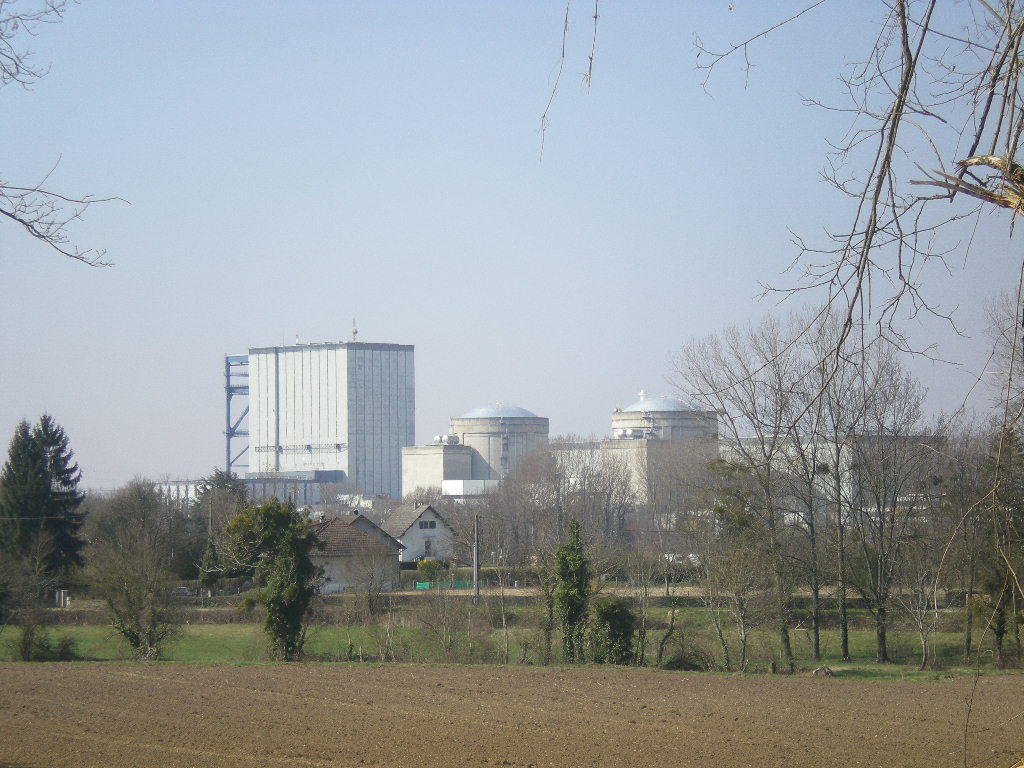 Photo montrant les réacteurs UNGG (carré) en attente de démantèlement et 2 REP (à coupole), des habitations devant.